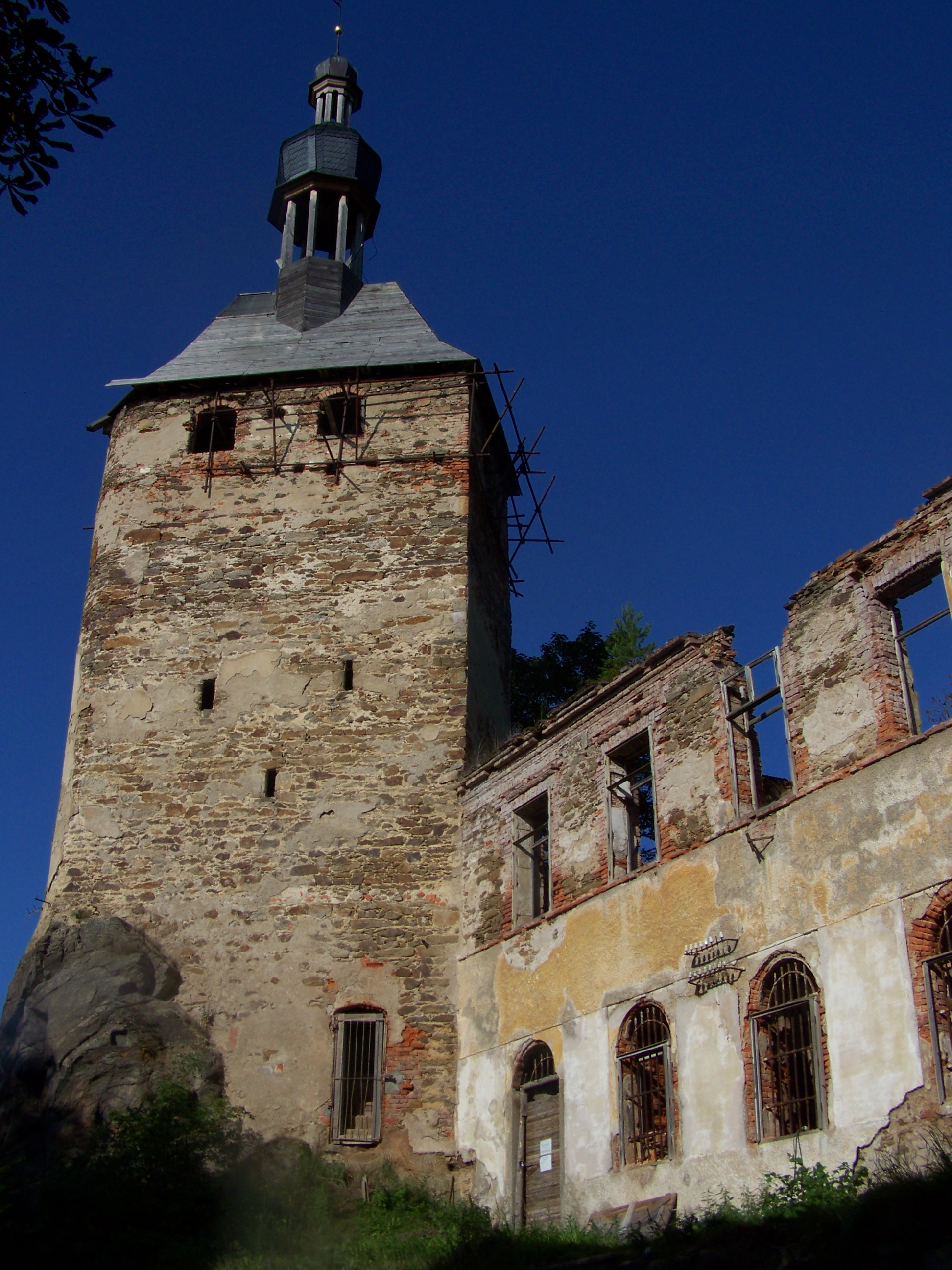 Hřebeny (Josefov), okres Sokolov, Česká republika; zříceniny zámku Hartenberg